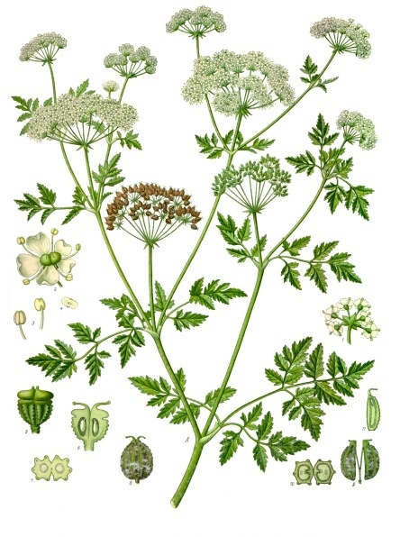 Gefleckter Schierling. A blühender und fruchtender Zweig, nat. Gr.; 1 Döldchen von der Rückseite, vergrössert; 2 Blüthe, desgl.; 3 Staubgefässe, desgl.; 4 Pollen, desgl.; 5 Stempel, desgl.; 6 derselbe im Längsschnitt, desgl.; 7 derselbe im Querschnitt, desgl.; 8 Frucht, desgl.; 9 Theilfrüchtchen mit Fruchtträger, desgl.; 10 Frucht im Querschnitt, desgl.; 11 Theilfrüchtchen im Längsschnitt, desgl.